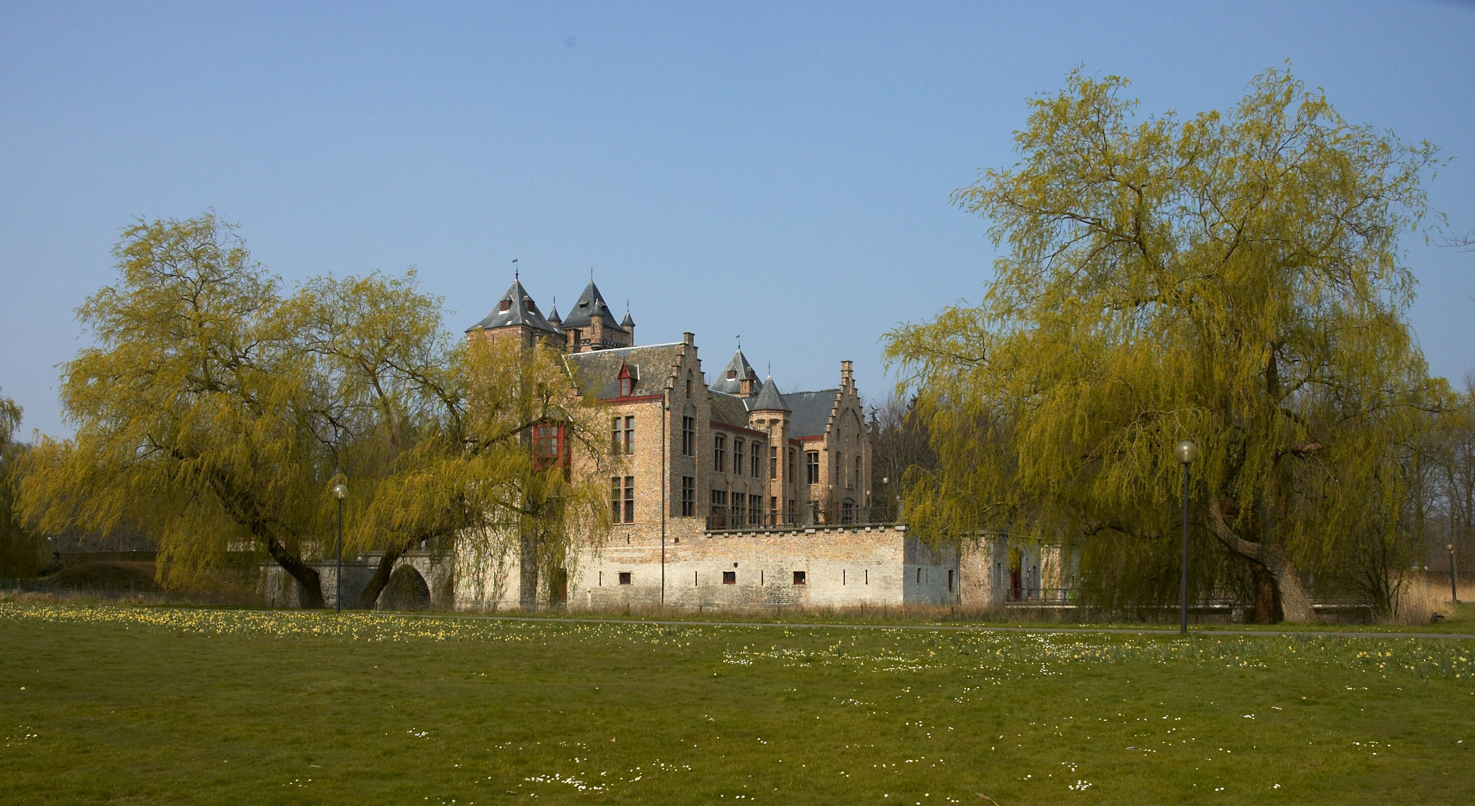 Streekhuis Kasteel Tillegem, Brugge, België.